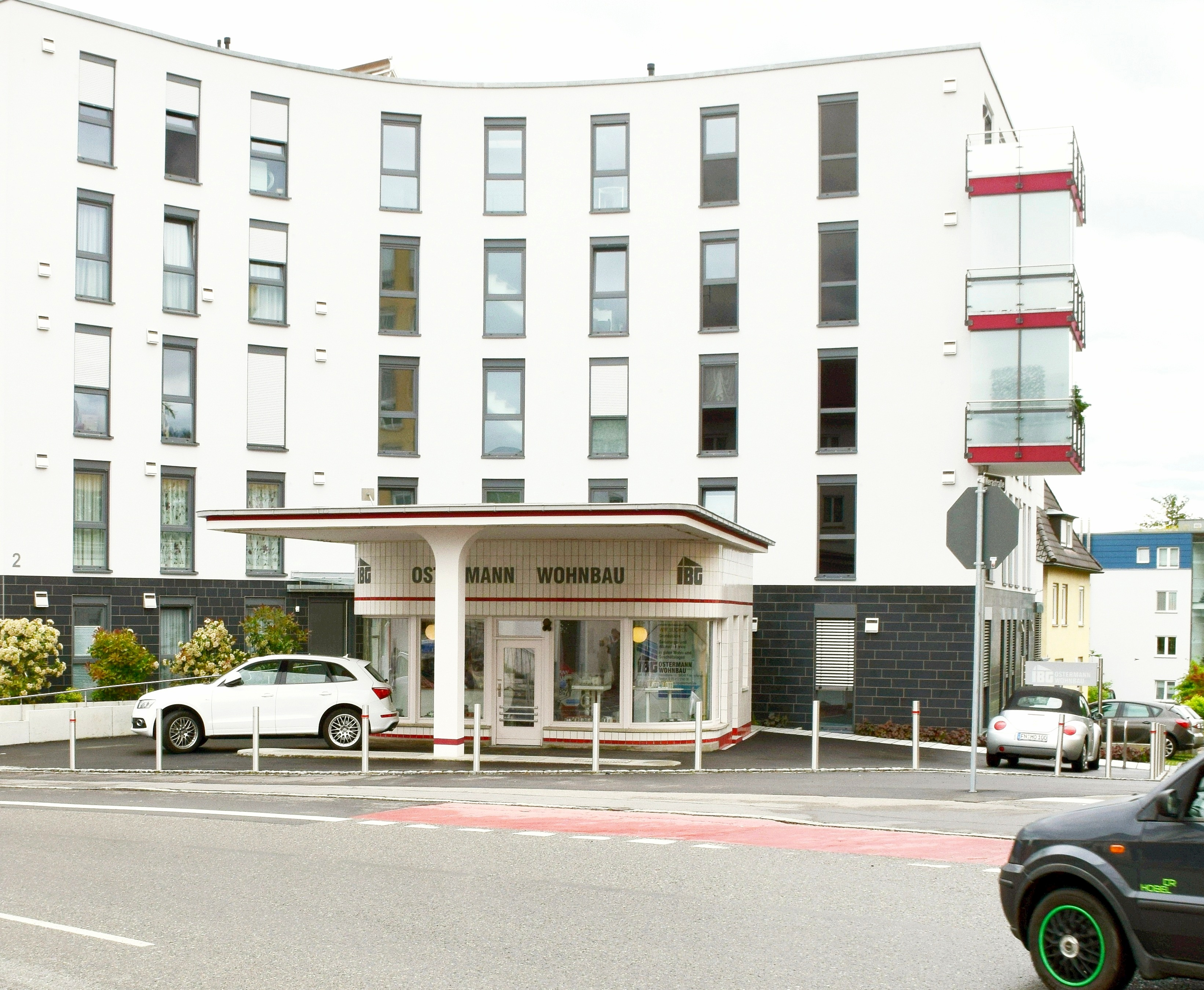 Die ehemalige Esso-Tankstelle in Friedrichshafen Werastraße nach der Instandsetzung und Umnutzung 2016